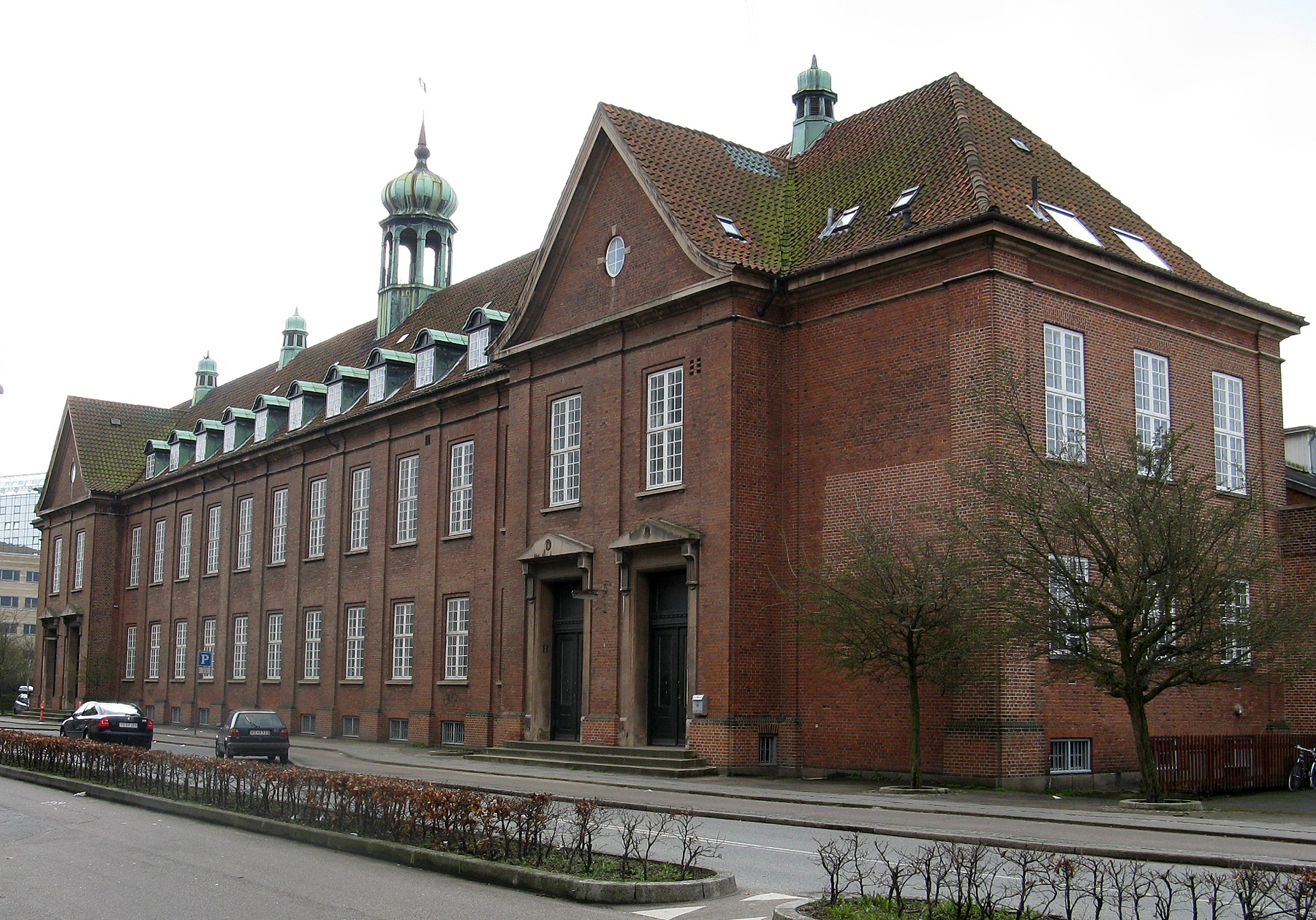 Aarhus Godsbanegaard, Jylland, Denmark